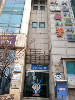 도화1동 주민자치센터. 경인로 방향.